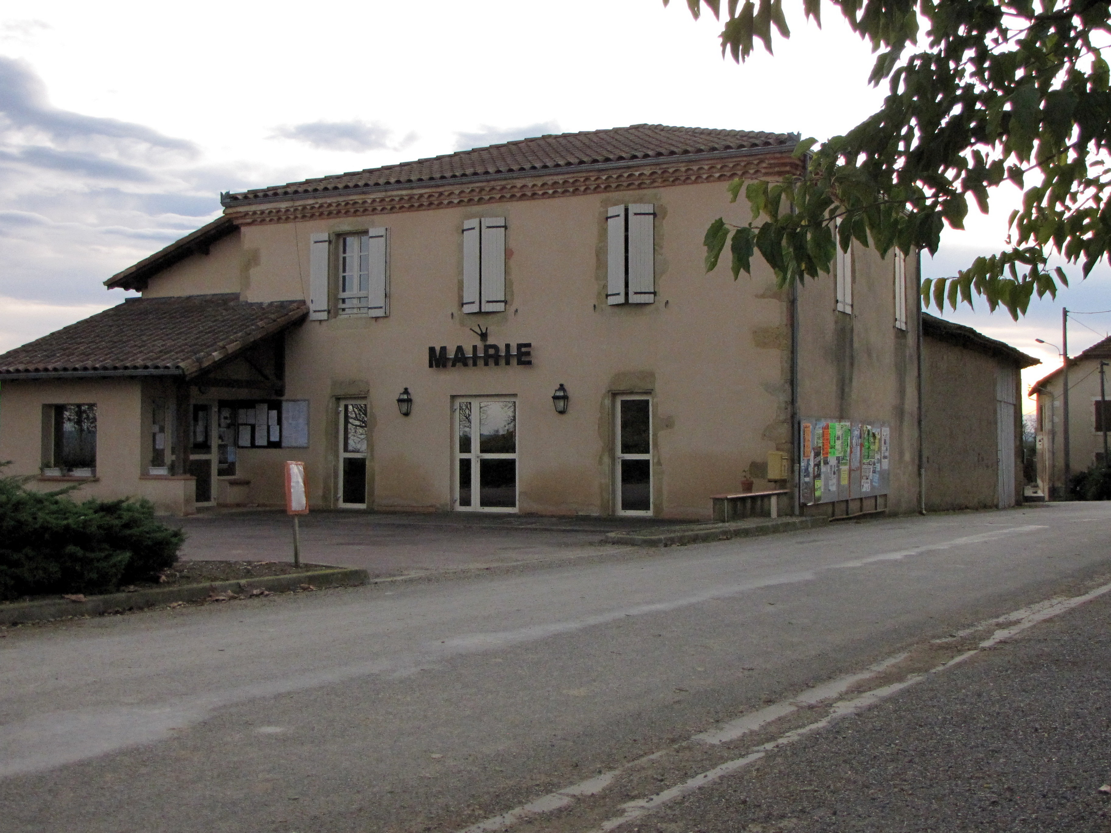 Saint-Ferréol-de-Comminges